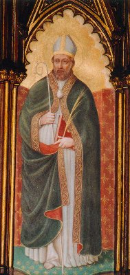 Bild des Heiligen Foillan in der Kirche Saint-Nicolas du Roeulx in Fosses